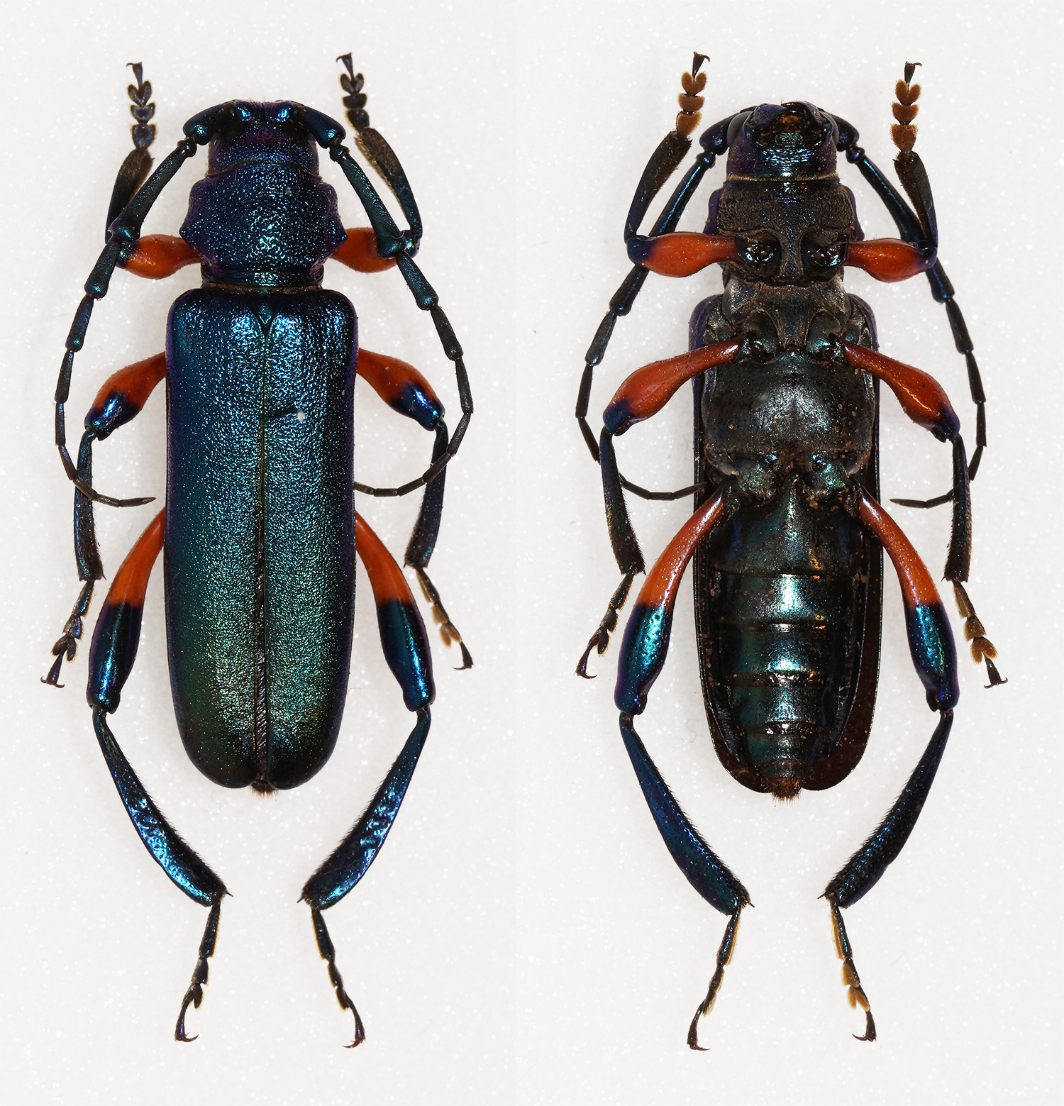 Gerstaecker,1855 Sex: Male Data: 12-12-10 - Maloloi Village - Milama Ward - Mvomero District - Tanzania Size: 27.5mm